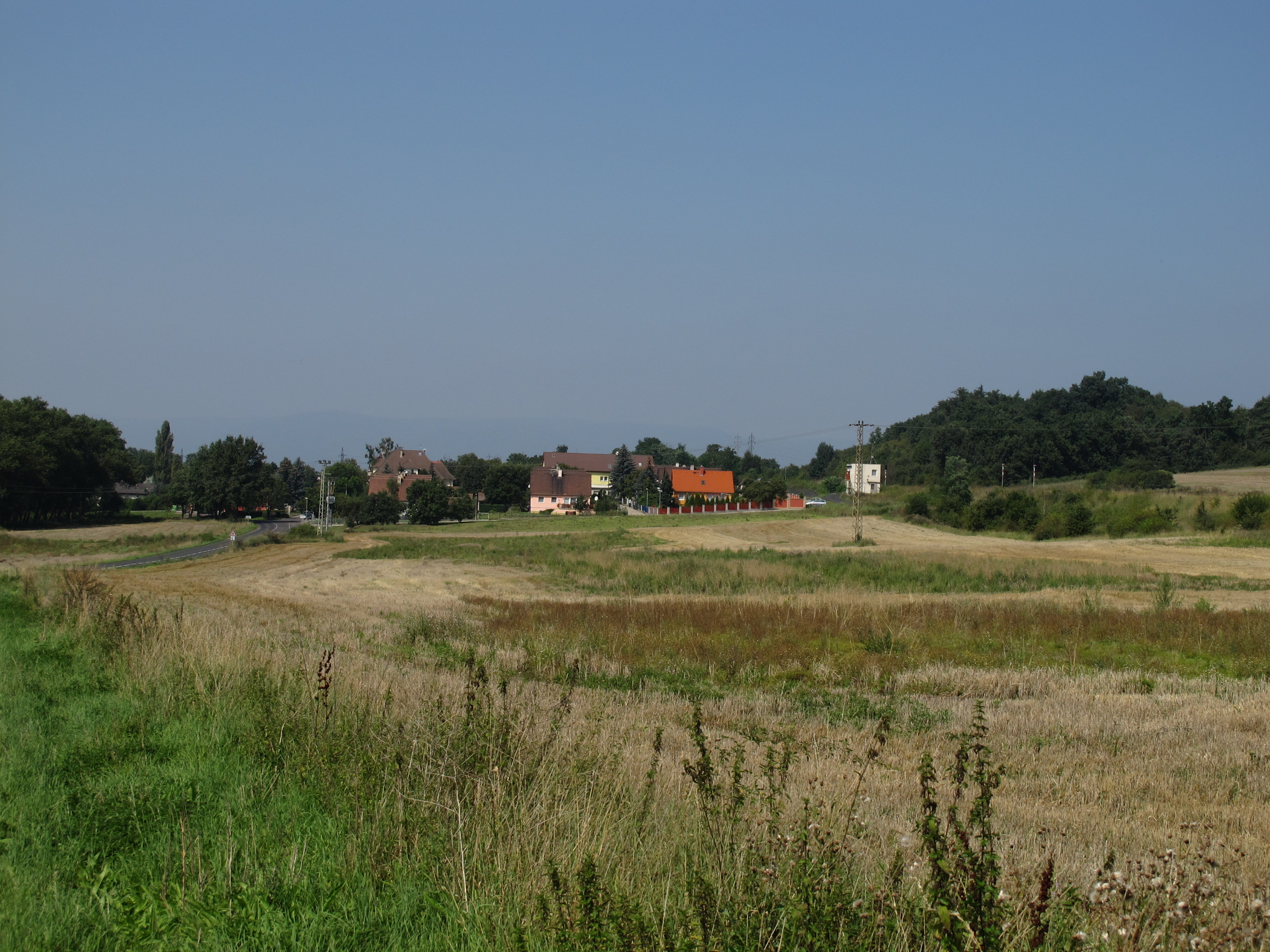 Obec Lišnice v okrese Most